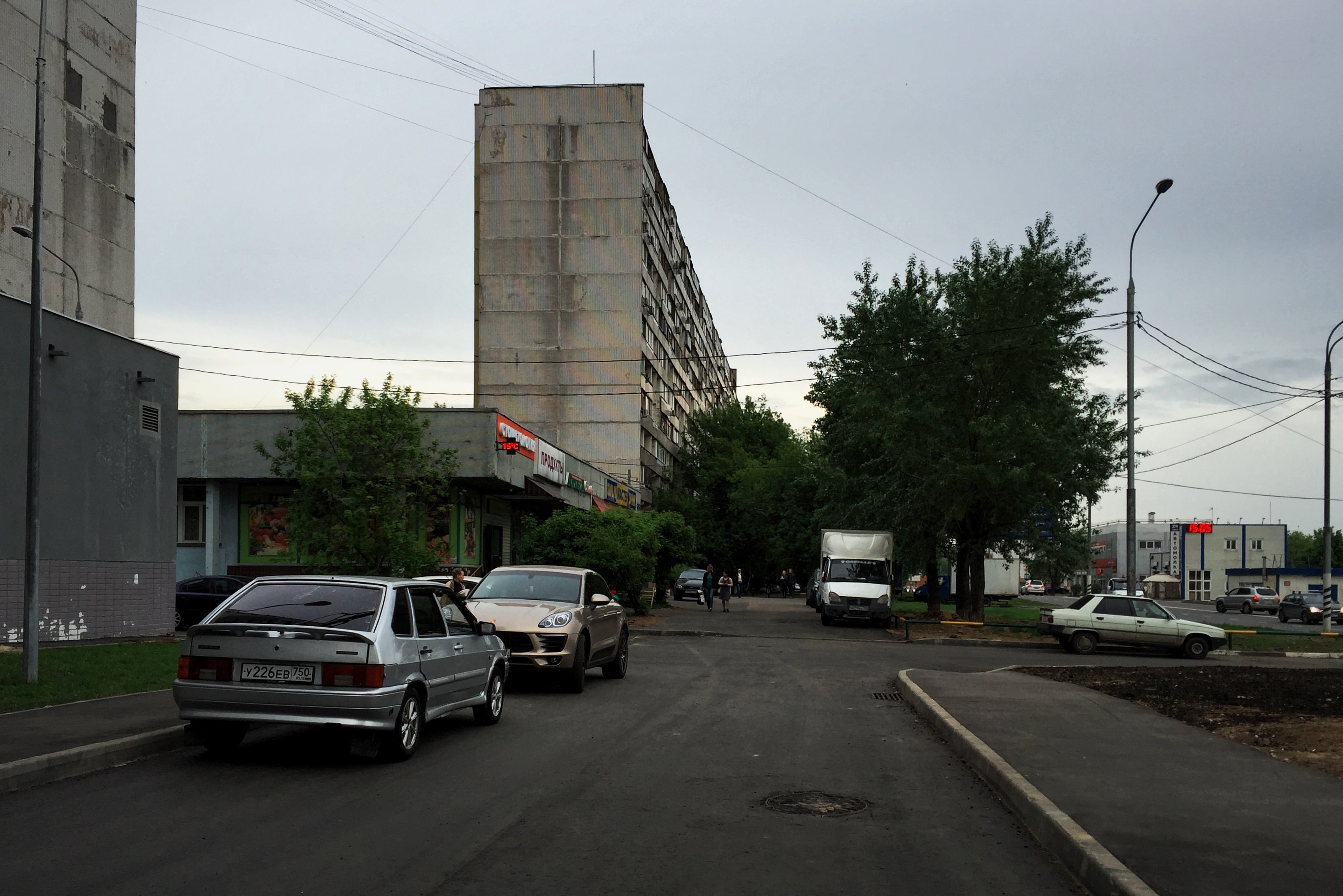 Берёзовая аллея. В центре дом 7, справа пристройка к дому 5